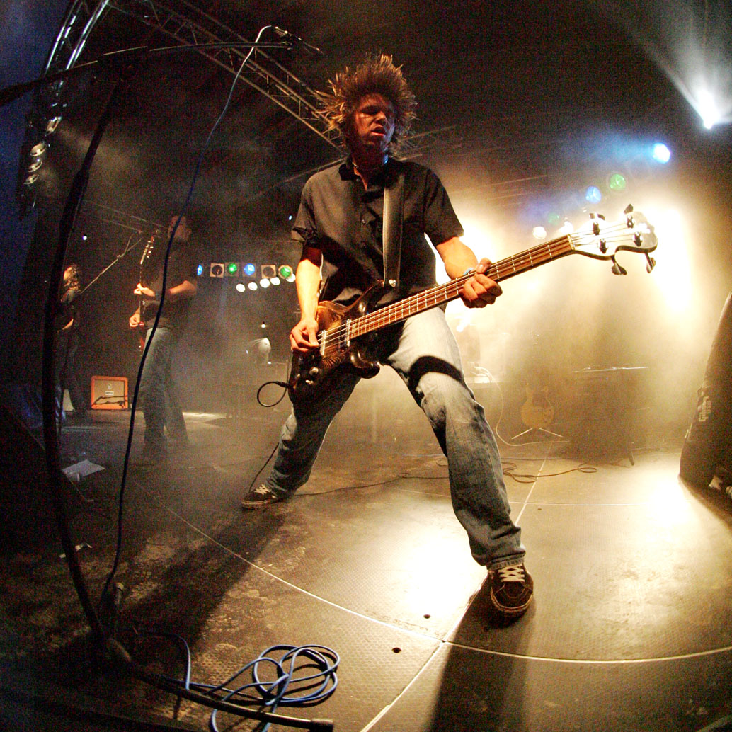 Venerea auf dem Mair1 Festival 2007